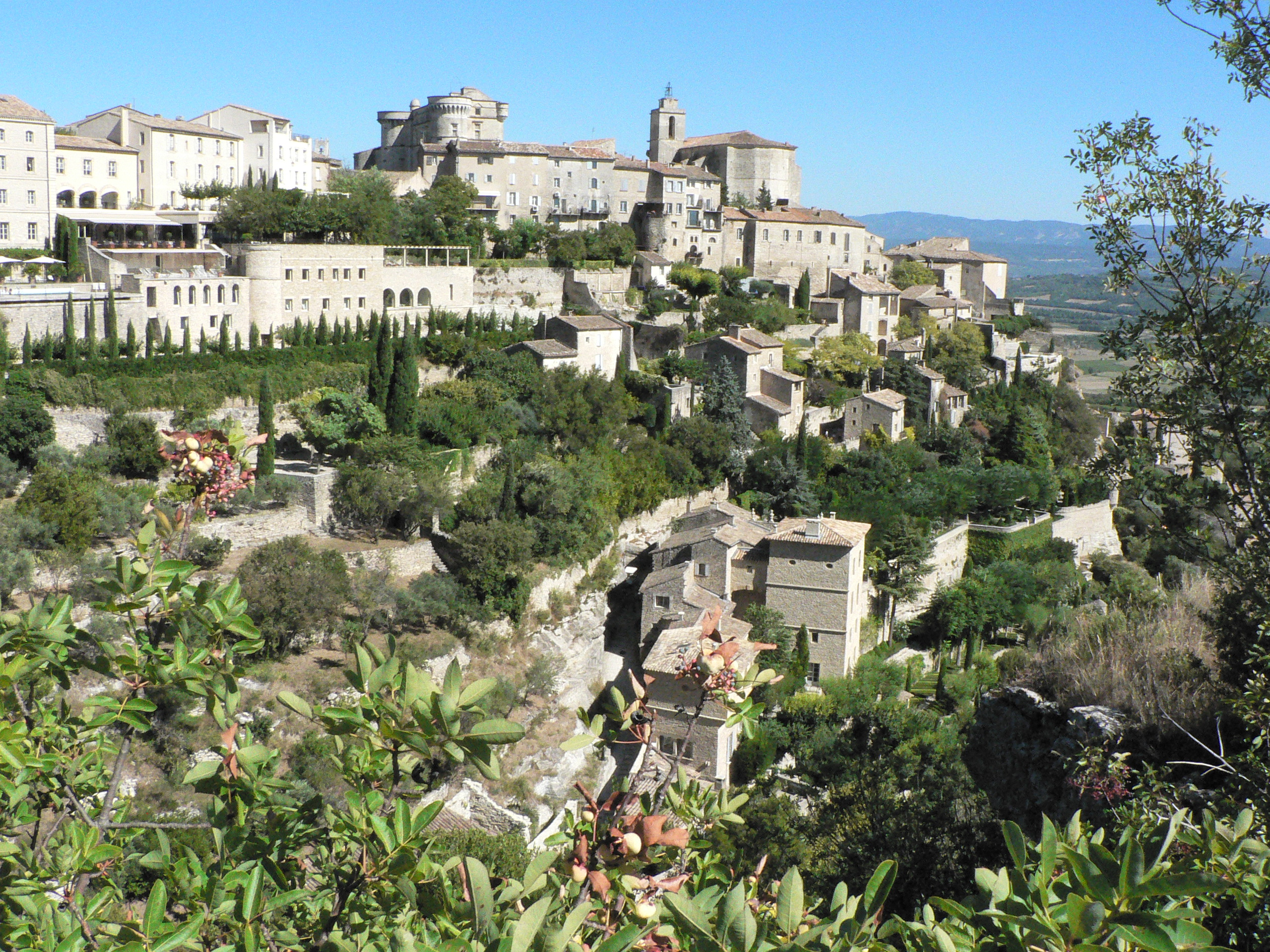 Gordes